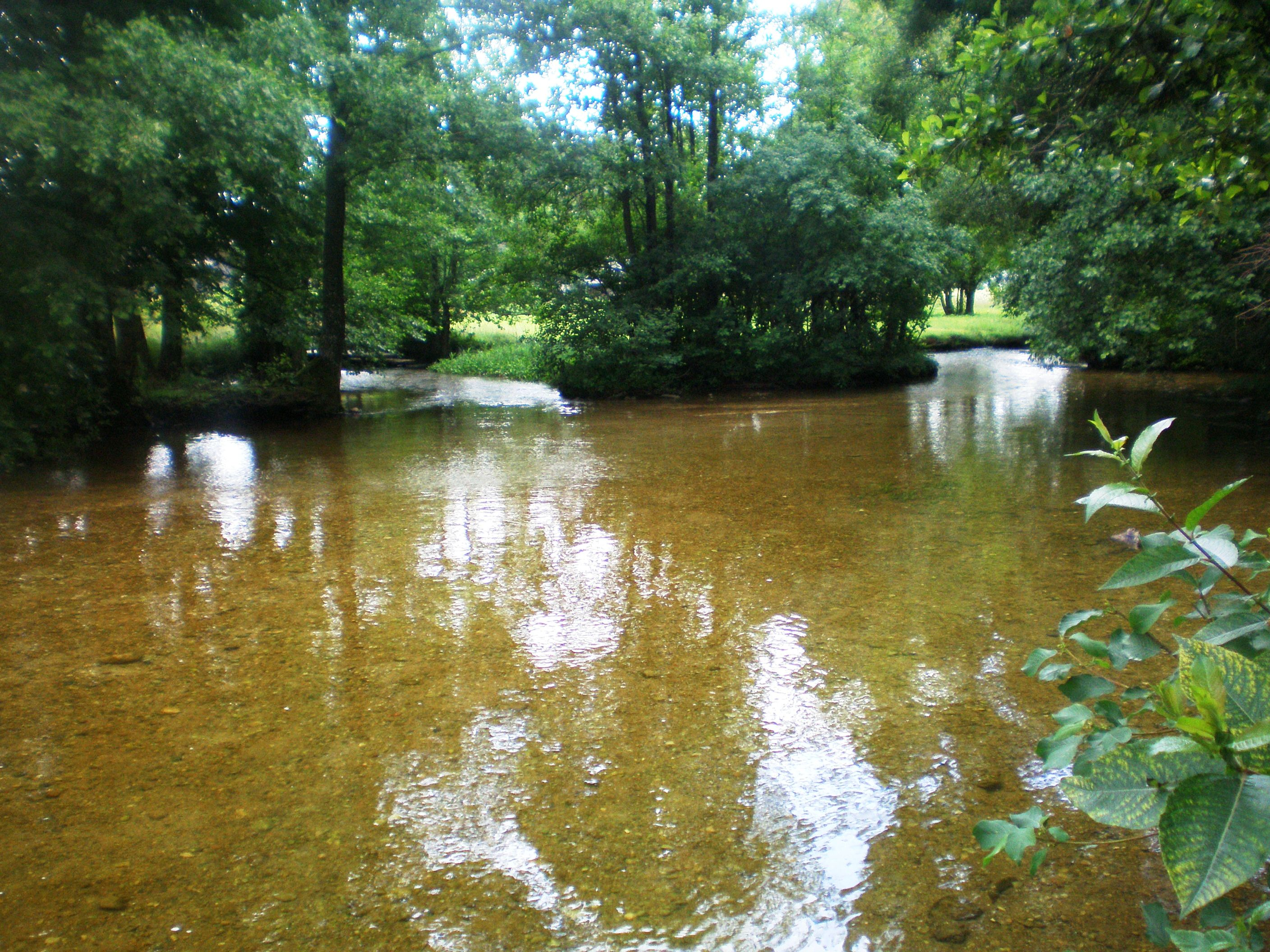 Srovė river in Ginučiai village, Lithuania